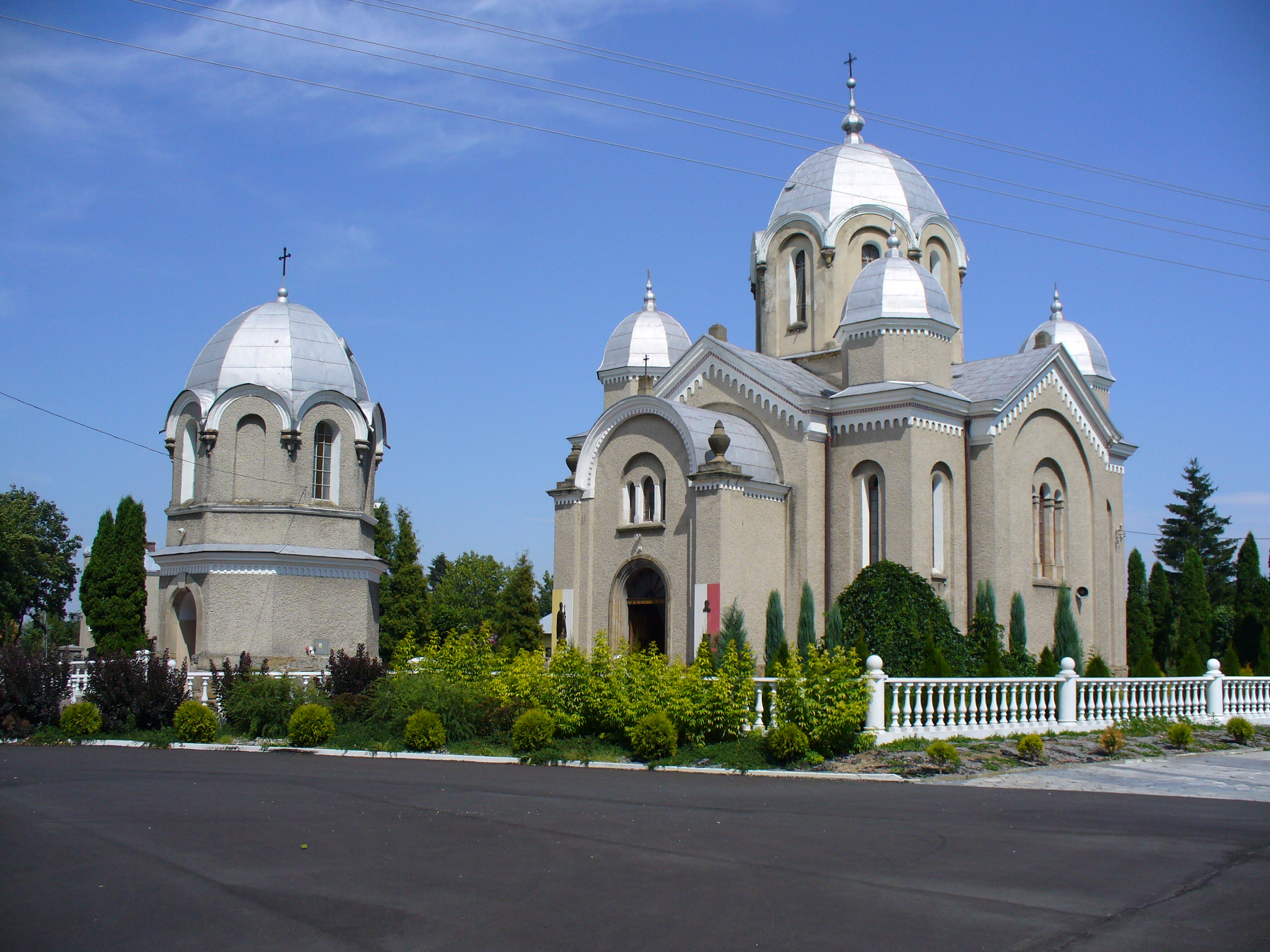 Wróblik Królewski